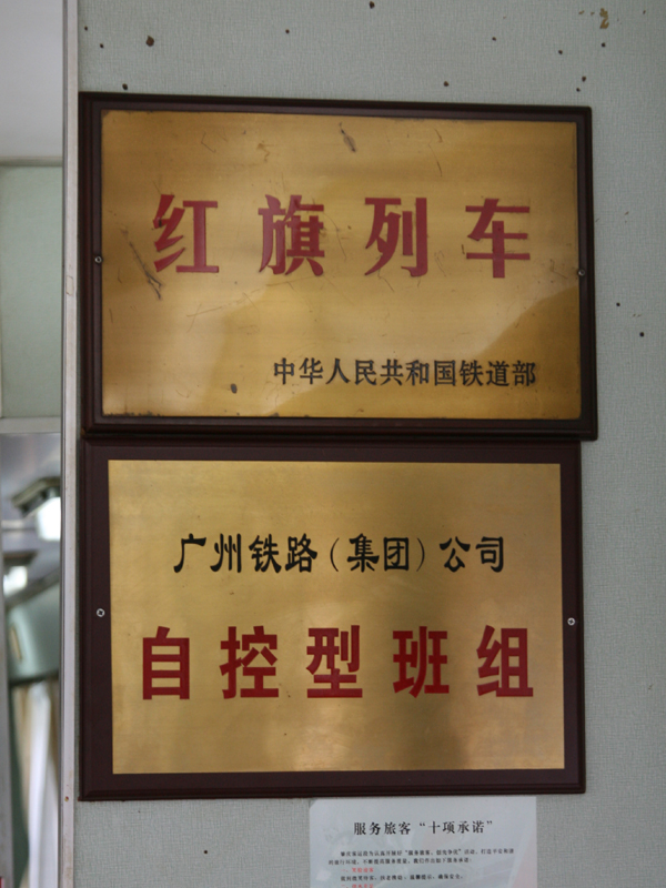 红旗列车铭牌。